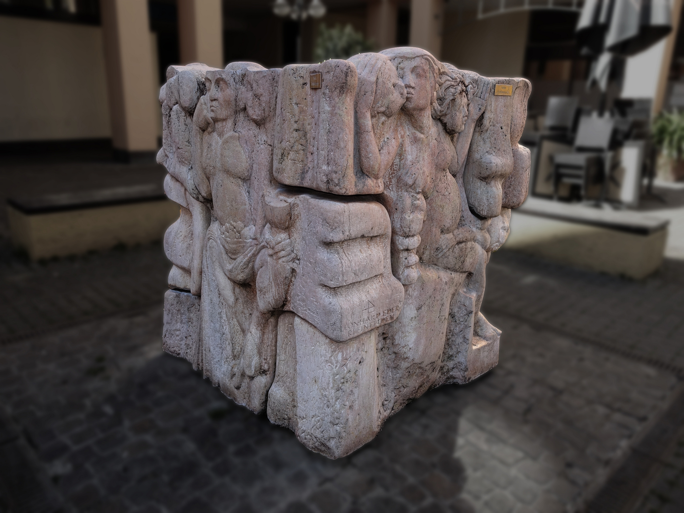 Leonhard Eder (1936) Kalkstein Brunnen, 1984, Die Jahreszeiten, Vier Lebenszeiten, an der Weinbrennerstraße 2, Lörrach